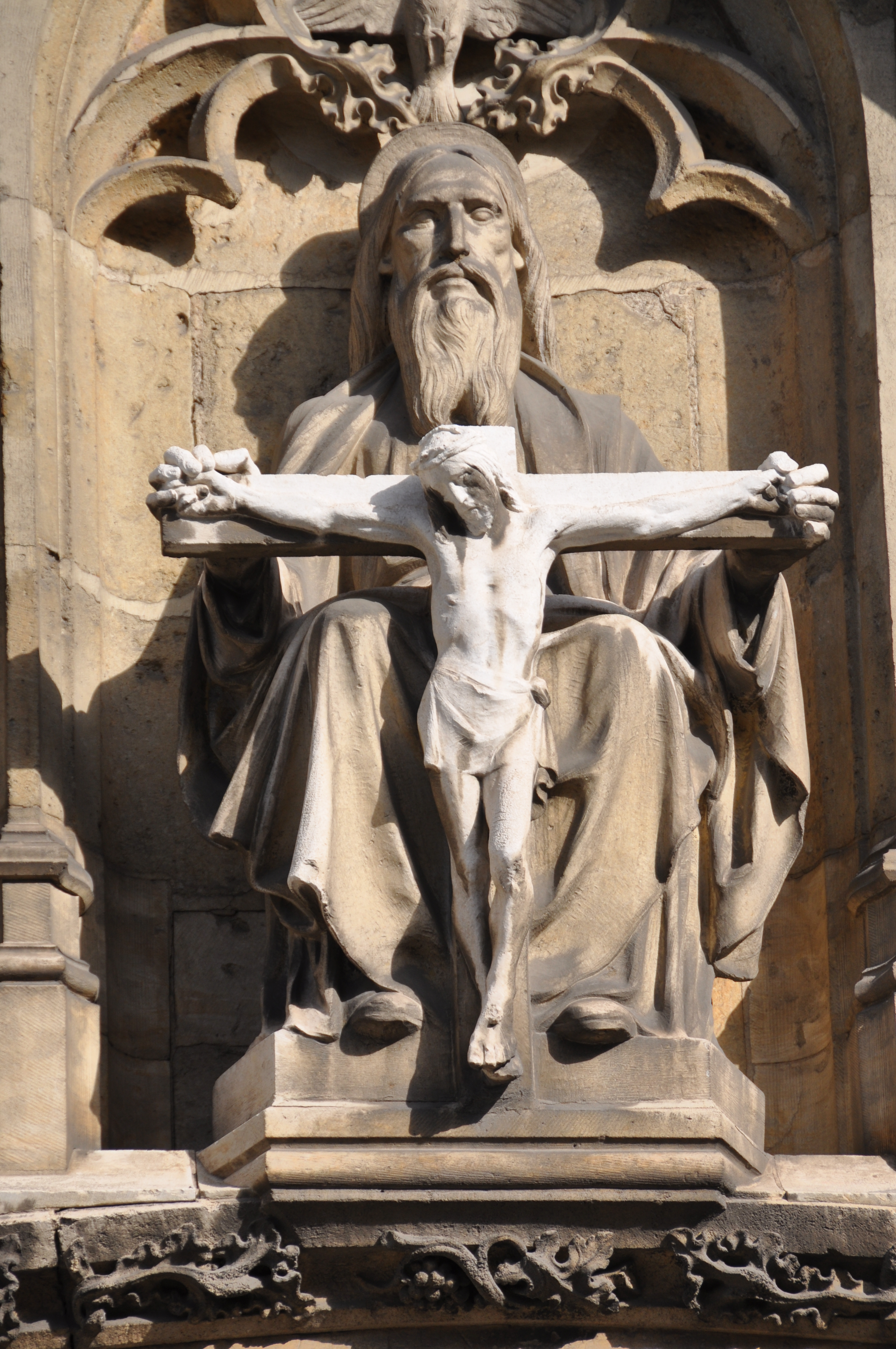 Statue du Christ a l'entrée de ND de la Chapelle (Bruxelles)